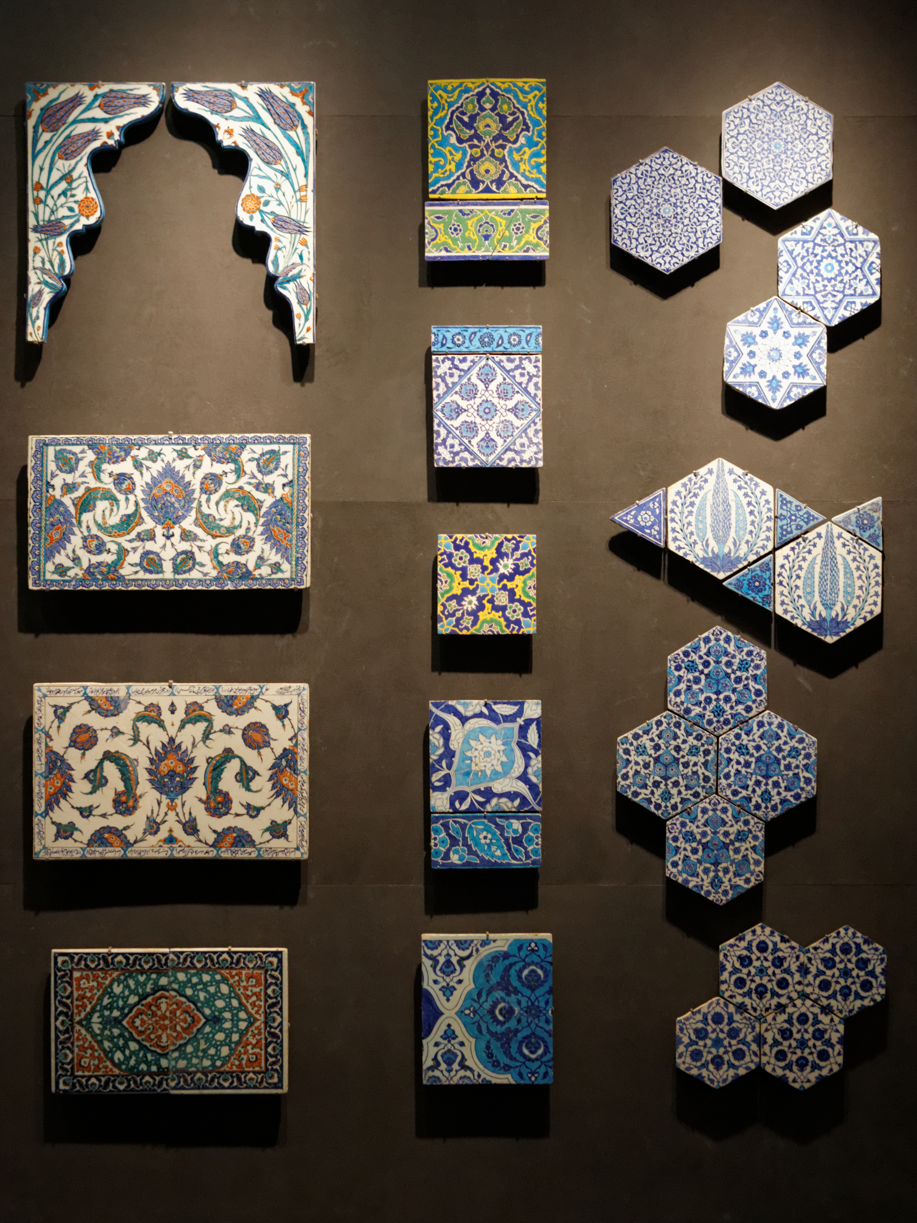 Carreaux de céramique ottomans. 16th century-19th century Musée du Louvre, Atlas database: entry 35830 (Inventory)Louvre Museum Native nameMusée du LouvreLocationParisCoordinates48° 51′ 37″ N, 2° 20′ 15″ E Established1793Website control : Q19675 VIAF: 257711507 ISNI: 0000 0001 2260 177X ULAN: 500125189 LCCN: n80020283 NLA: 35912436 WorldCat Arts de l'Islam, room Espace B: L'Empire ottoman. Denon, Entresol. This work is part of the collections of the Louvre (Department of Islamic Art).